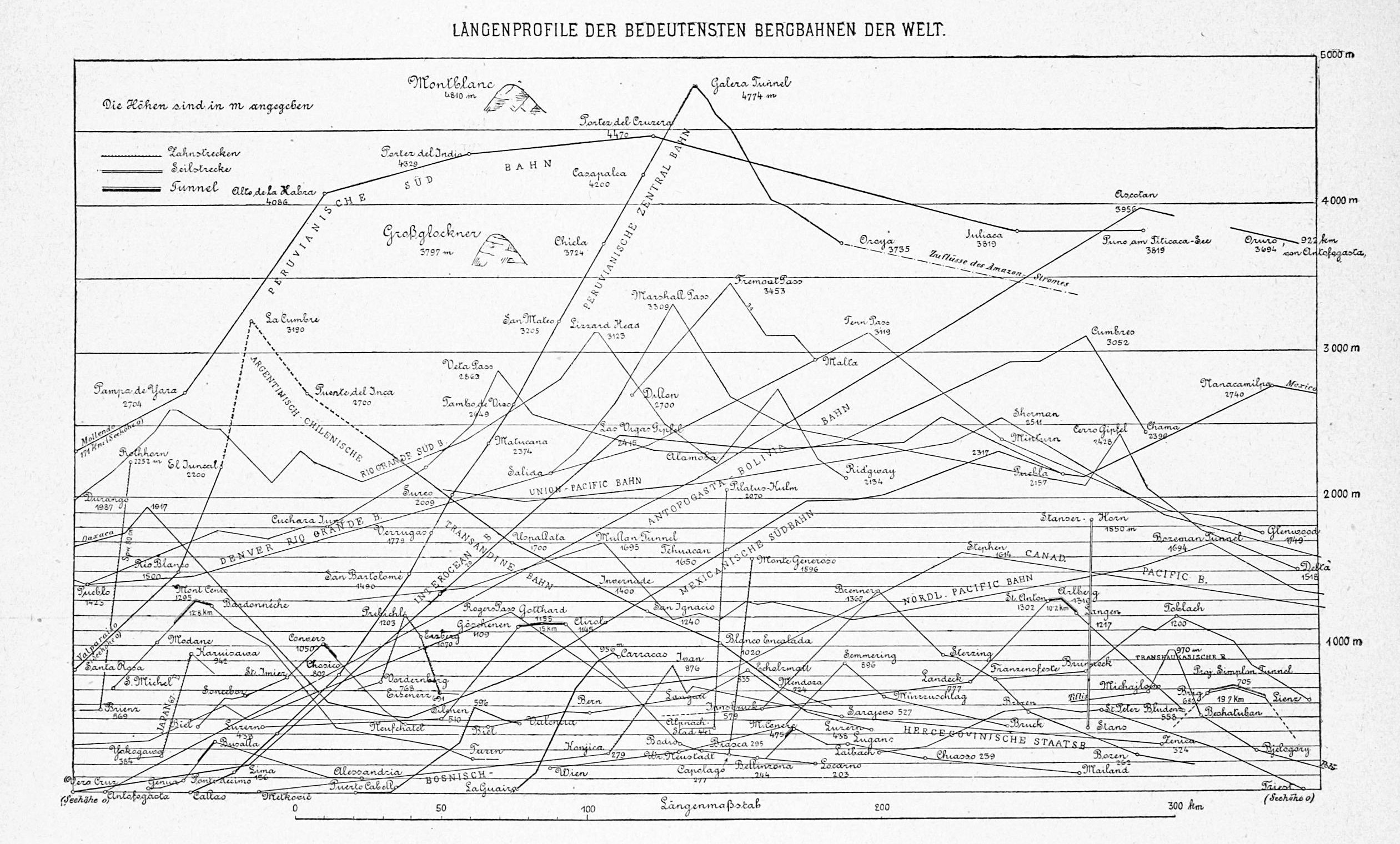 Längenprofile der bedeutensten Bergbahnen der Welt (Grafik von 1896)